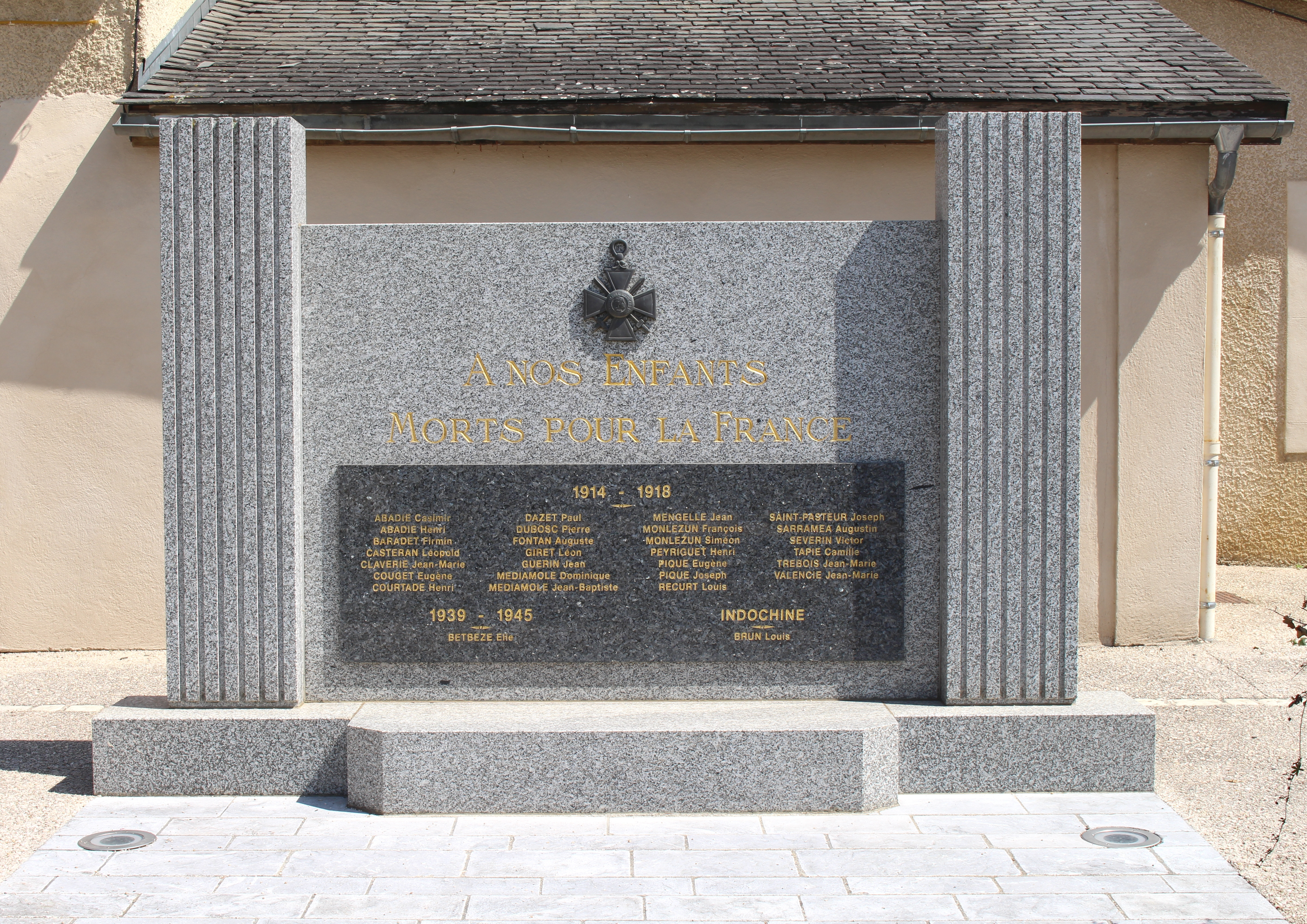 Monument aux morts de Bonnefont (Hautes-Pyrénées)